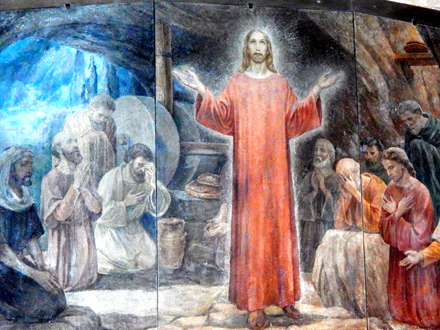 Jerozolima, Grota Pojmania Jezusa, Grota Getsemani